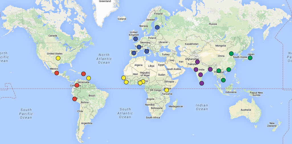 یک نقشه جغرافیایی از جوامعی که در نمونه گیری‌های 1000 ژنوم حضور داشته‌اند